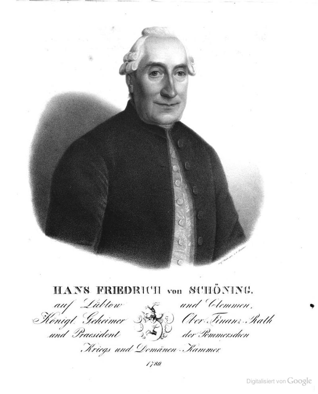 Hans Friedrich von Schoening (* 1717; † 29. November 1787), geheimer Rat, Präsident der pommerschen Domainenkammer